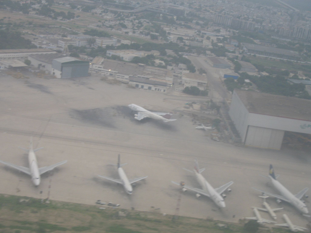 Maintenance Side